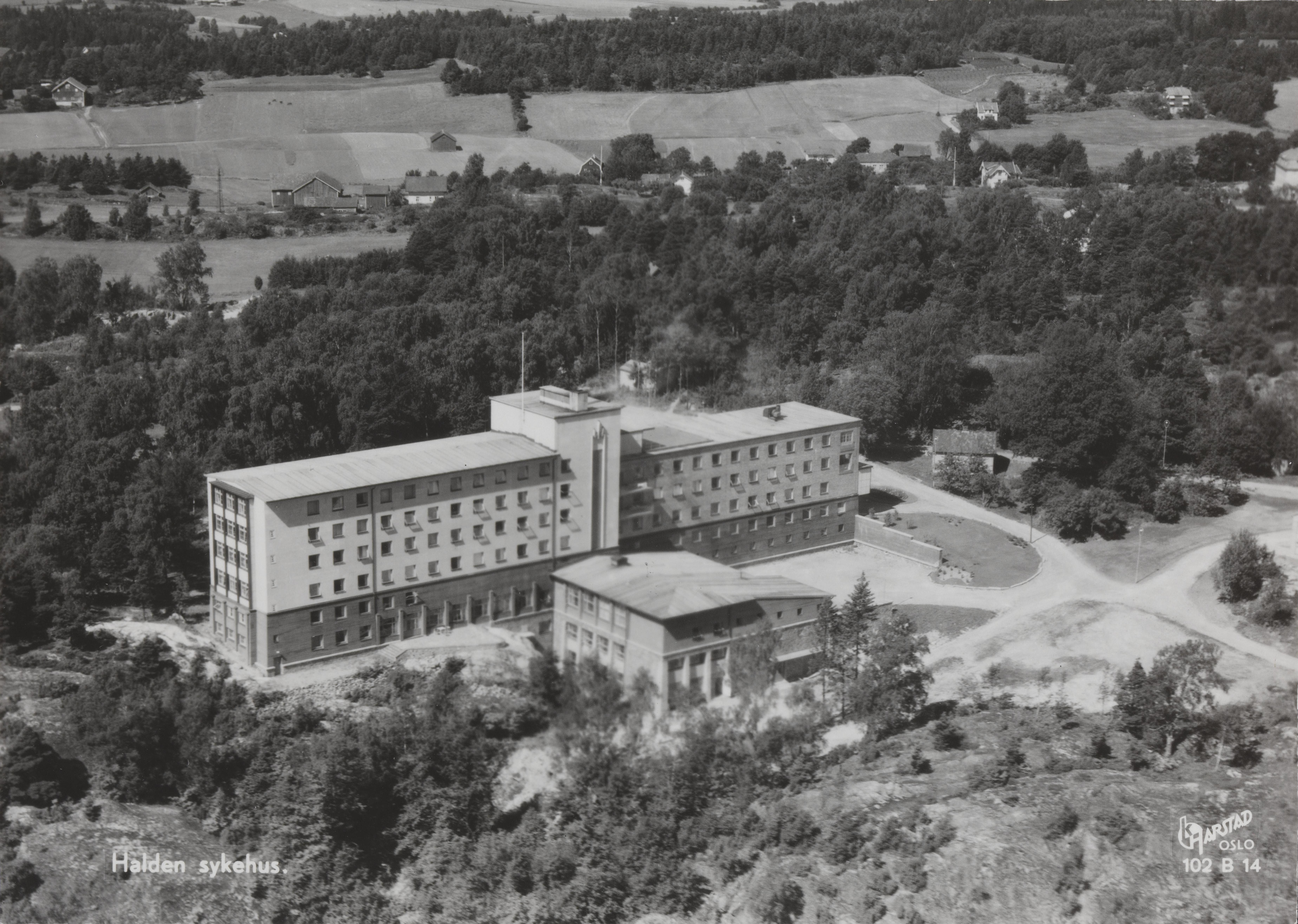 Bildet er hentet fra Nasjonalbibliotekets bildesamling Halden,Kjærlighetsstien 30, Halden, Østfold